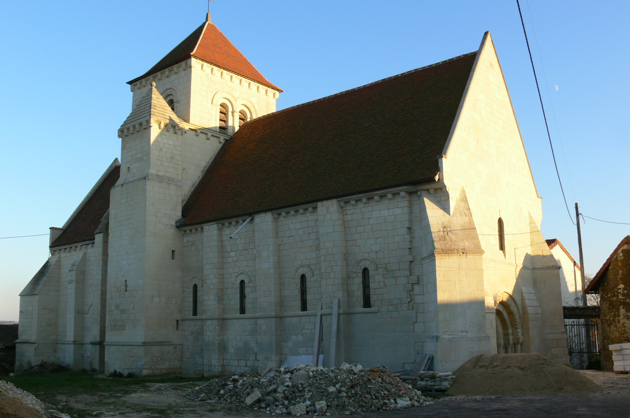 Église Saint-Pierre de Savigny-sous-Faye